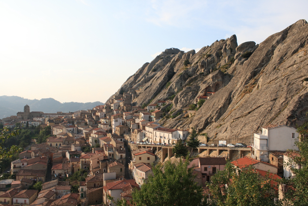 Vista del comune di Pietrapertosa